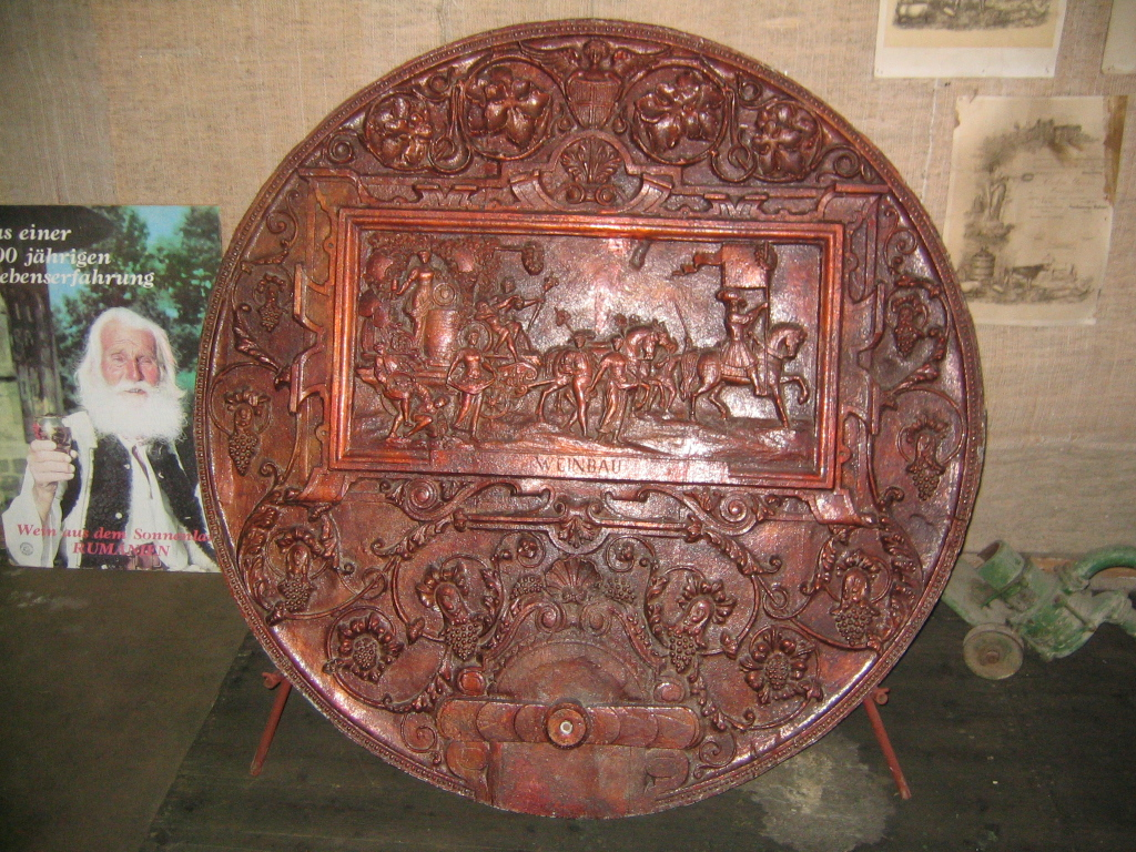 Capac de butoi ornat cu motive viticole si țărănești, tipic șvăbesc, expus la Muzeul Vinului din Teremia Mare, județul Timiș.